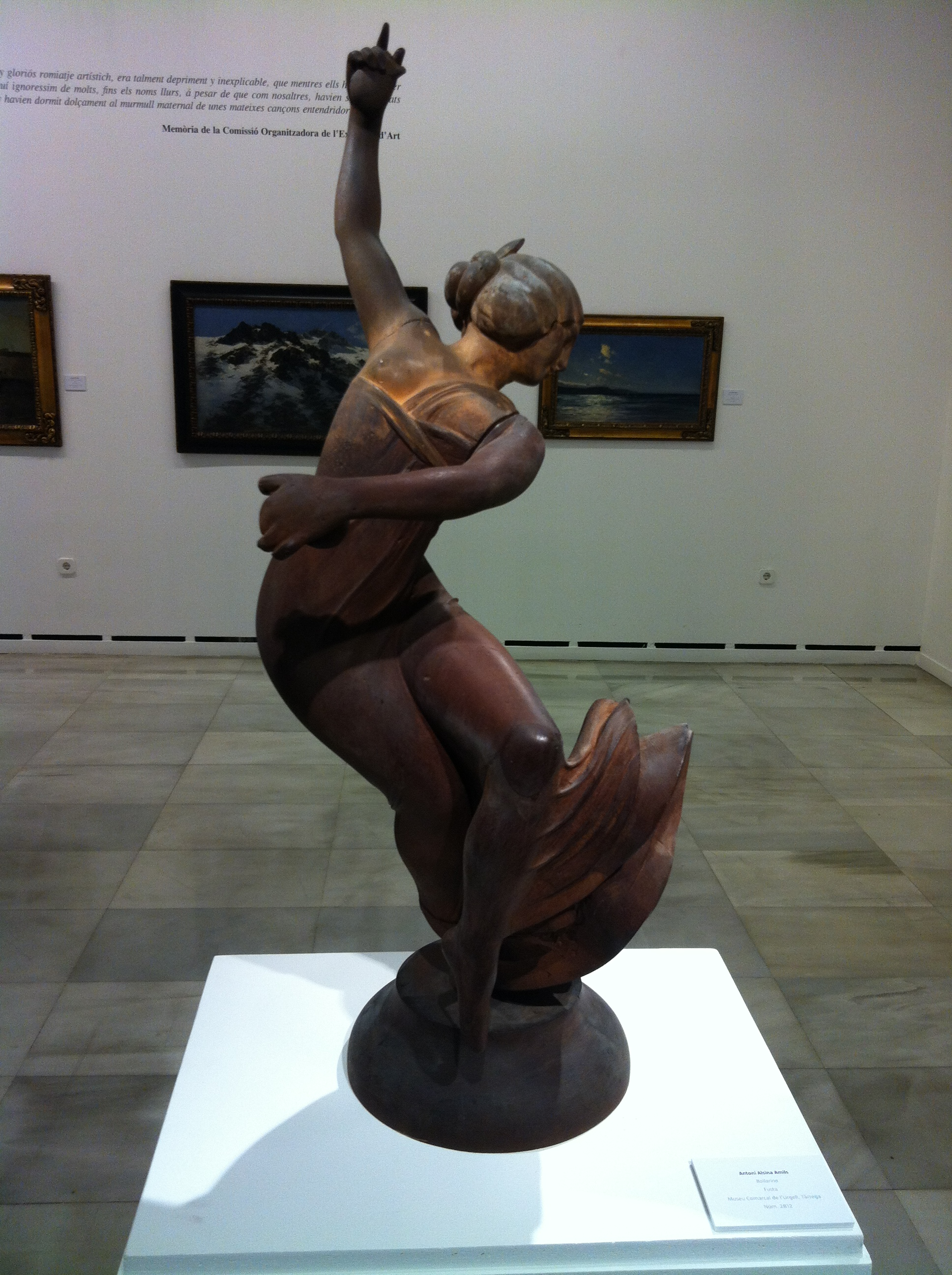 L'Exposició d'Artistes Lleidatans, també coneguda com l'exposició de 1912, fou una exposició col·lectiva d'artistes originaris de la província de Lleida celebrada als salons de la Paeria entre l'11 de maig i el 9 de juny de 1912. La mostra aplegà 29 artistes diferents, que presentaren un total de 219 peces. La fundació del Museu d'Art Jaume Morera pot entendre's com una conseqüència directa d'aquest esdeveniment. El 2012 el Museu Jaume morera en va fer una reedició de l'exposició.